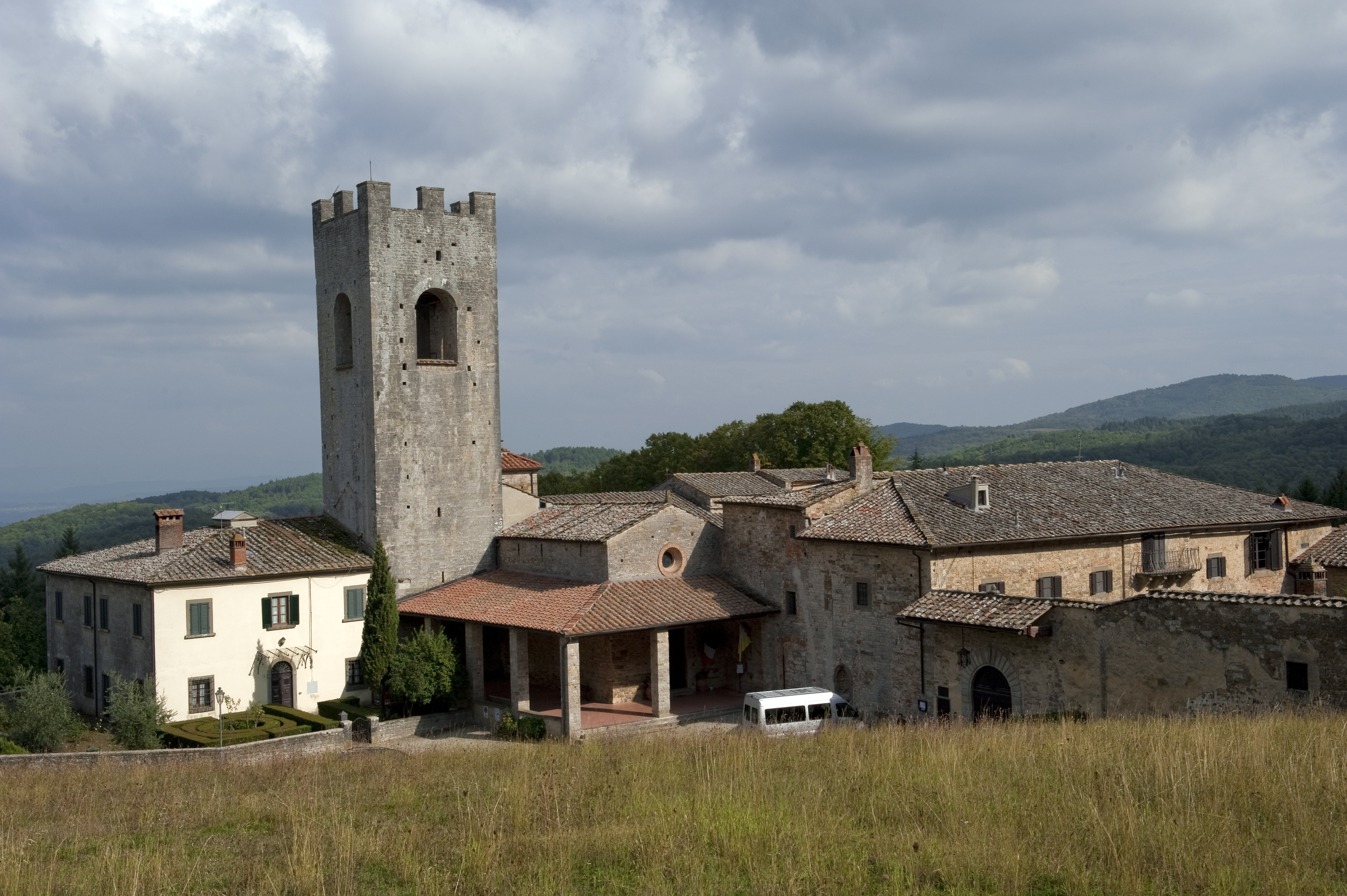 Panorama su Badia a Coltibuono